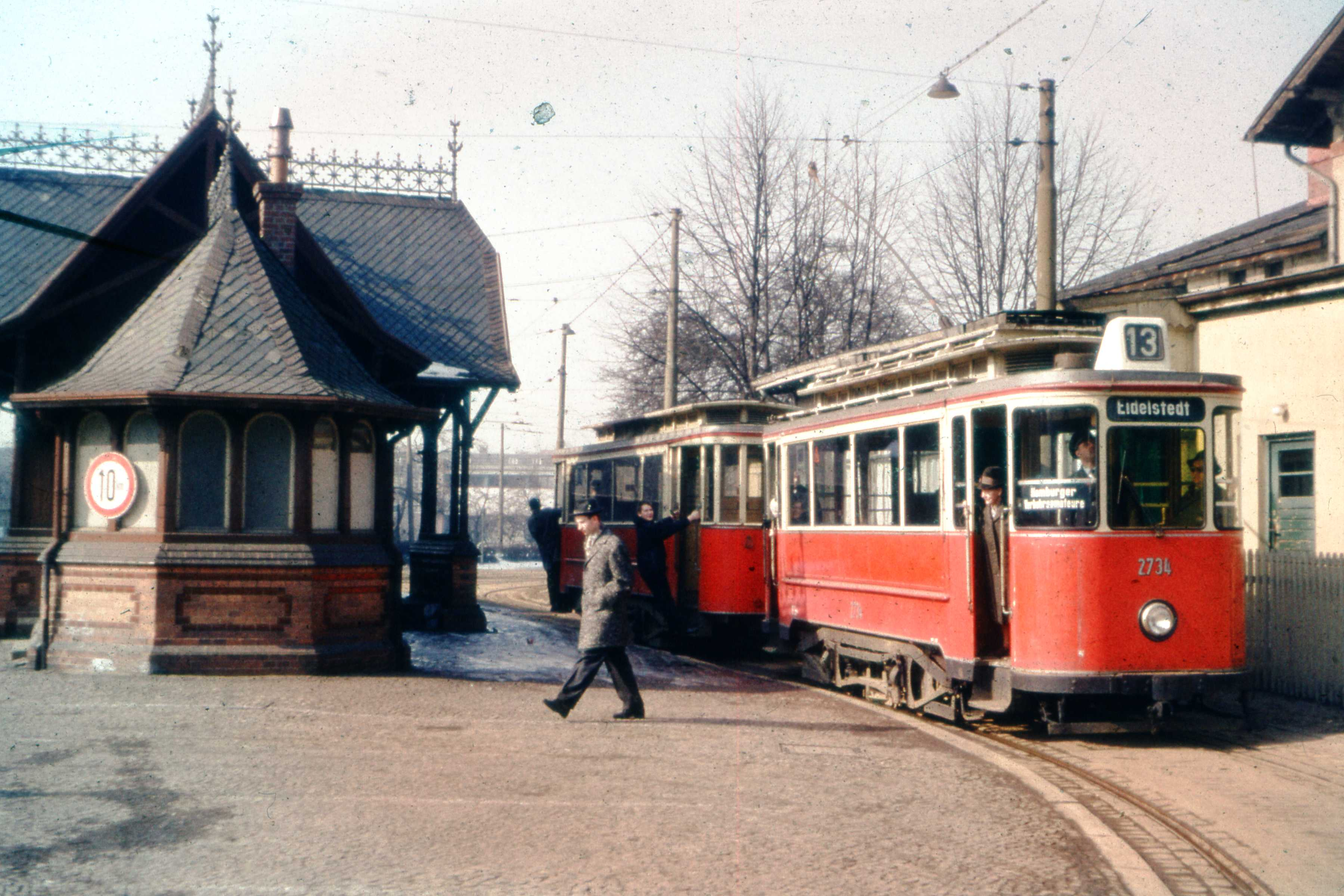 Straßenbahnhaltestelle Ohlsdorf, Im Grünen Grunde, Z2 und Z2B